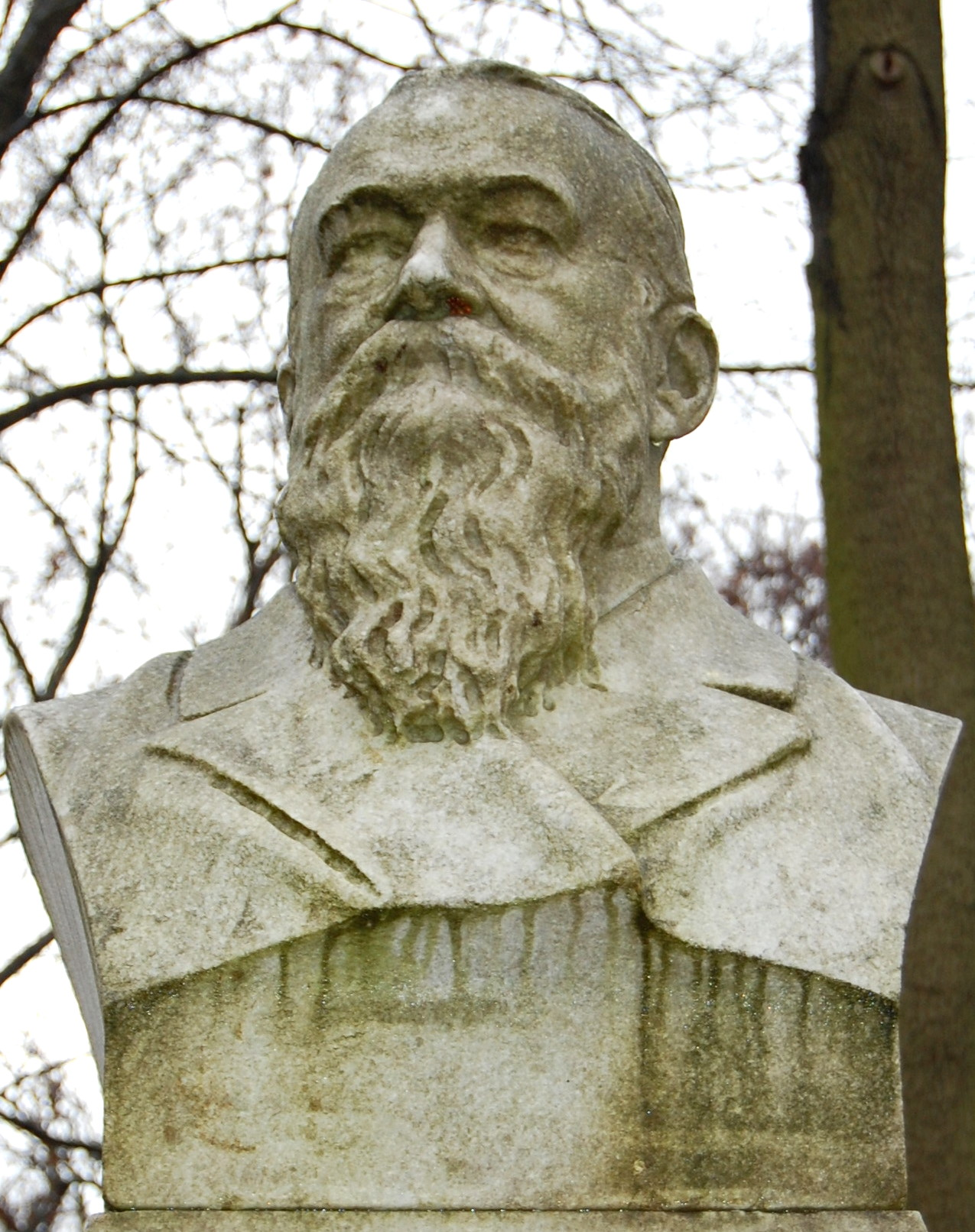 Büste von Ernst Leuschner in Lutherstadt Eisleben